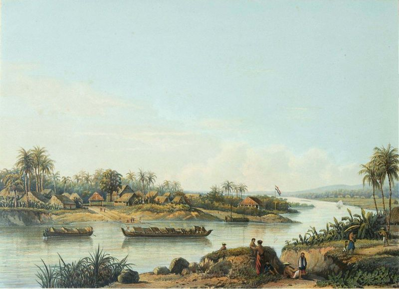 Litho. Litho naar een oorspronkelijk schilderij van A. Salm.. De rivier de Solo